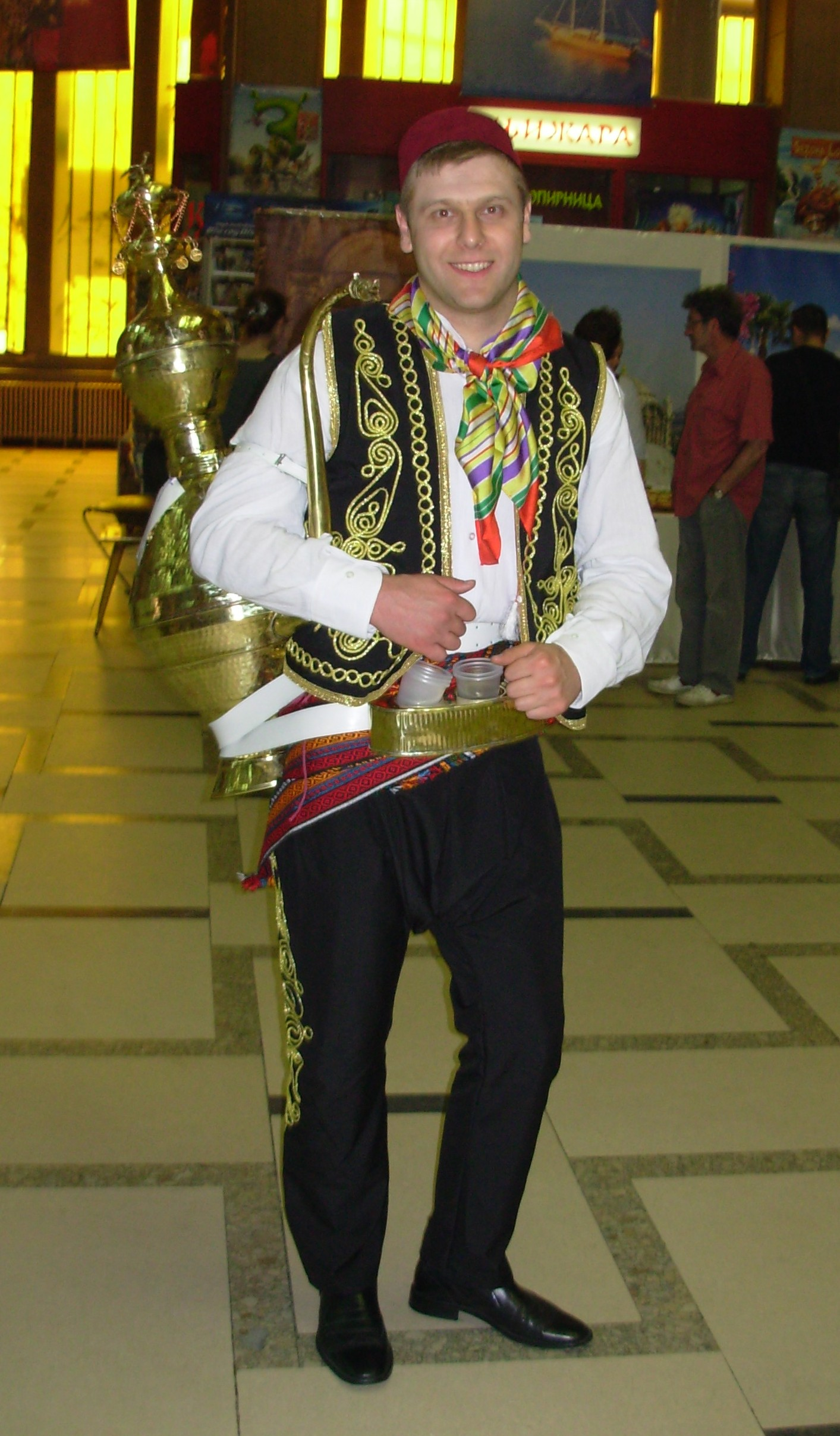 Шербеџија, снимљен у Дому Сидиката на "Данима Турске" у Београду. Сликао Голдфингер